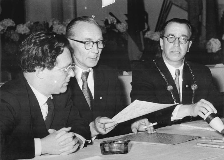 Zentralbild Krueger 4 Mot. 5.5.1954 Zweites öffentliches Plenum der Bauakademie. Am 5. Mai 1954 fand im Kulturhaus "Erich Weinert" in Berlin-Köpenick das zweite öffentliche Plenum der Deutschen Bauakademie, in Anwesenheit des Stellvertreters des Ministerpräsidenten und ersten Sekretärs des Zentralkomitees der Sozialistischen Einheitspartei Deutschlands Walter Ulbricht, des Stellvertreters des Ministerpräsidenten und Ministers für Auswärtige Angelegenheiten Dr. Lothar Bolz, des Ministers für Aufbau Winkler und des Ministers für Kultur, Stalinfriedenspreisträger, Nationalpreisträger Dr. Johannes R. Becher, statt. UBz: Der Berliner Chefarchitekt Professor Henselmann (links) im Gespräch mit dem Vizepräsidenten der Deutschen Bauakademie Professor Collein (Mitte) und dem Präsidenten der Deutschen Bauakademie Professor Dr. Kurt Liebknecht.